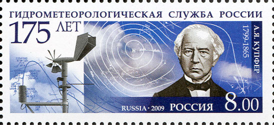 Марка России № 1316. 175 лет Гидрометеорологической службы России. А.Я. Купфер